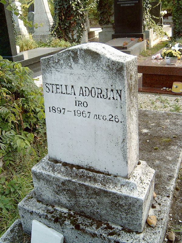 Stella Adorján (Középlak, 1897. január 30. – Budapest, 1967. augusztus 26.) újságíró, humorista, műfordító, színpadi szerző sírja Budapesten. Kozma utcai izraelita temető: 5B-8-12